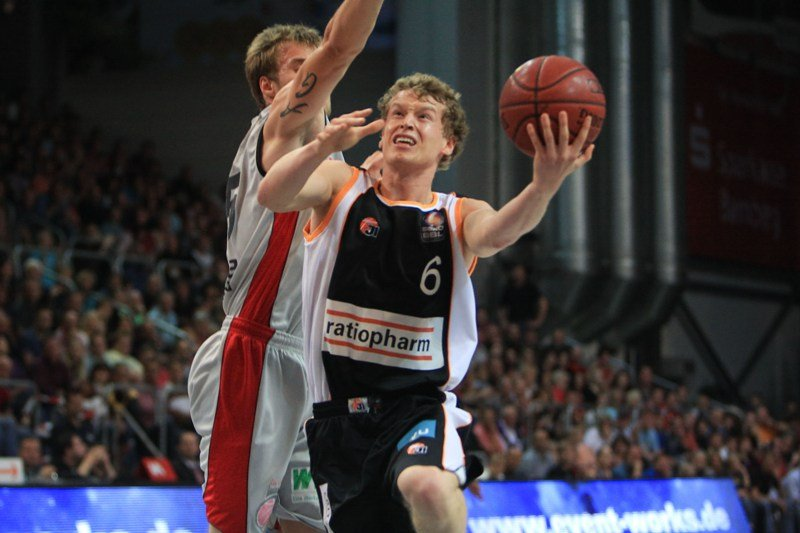 Per Günther gegen Anton Gavel im Spiel gegen die Brose Baskets aus Bamberg.